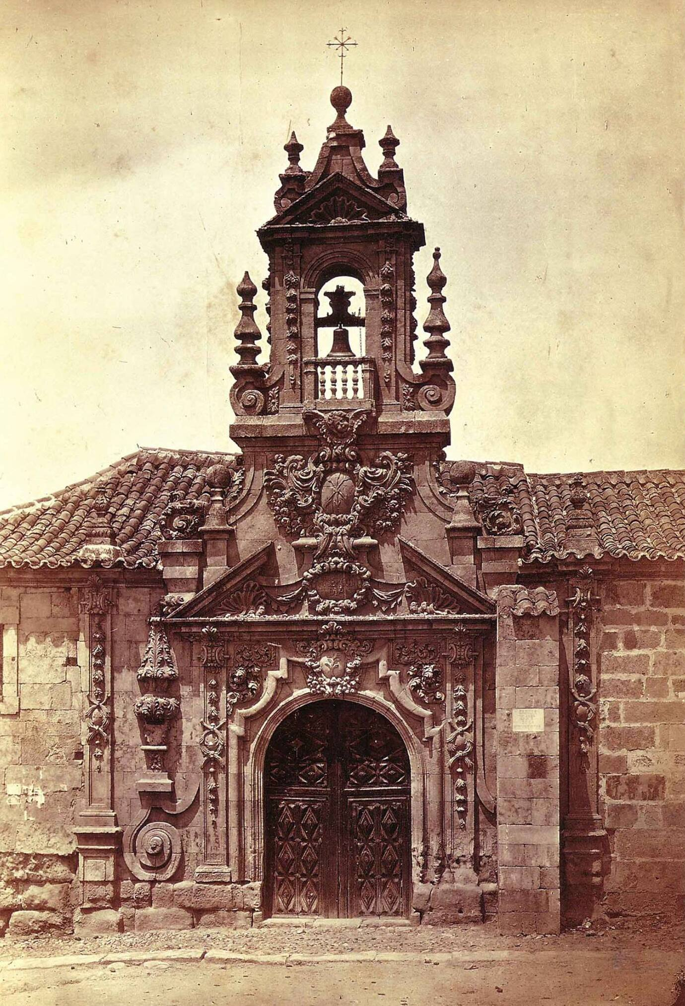 Estado antiguo de la Ermita de la Misericordia 1863